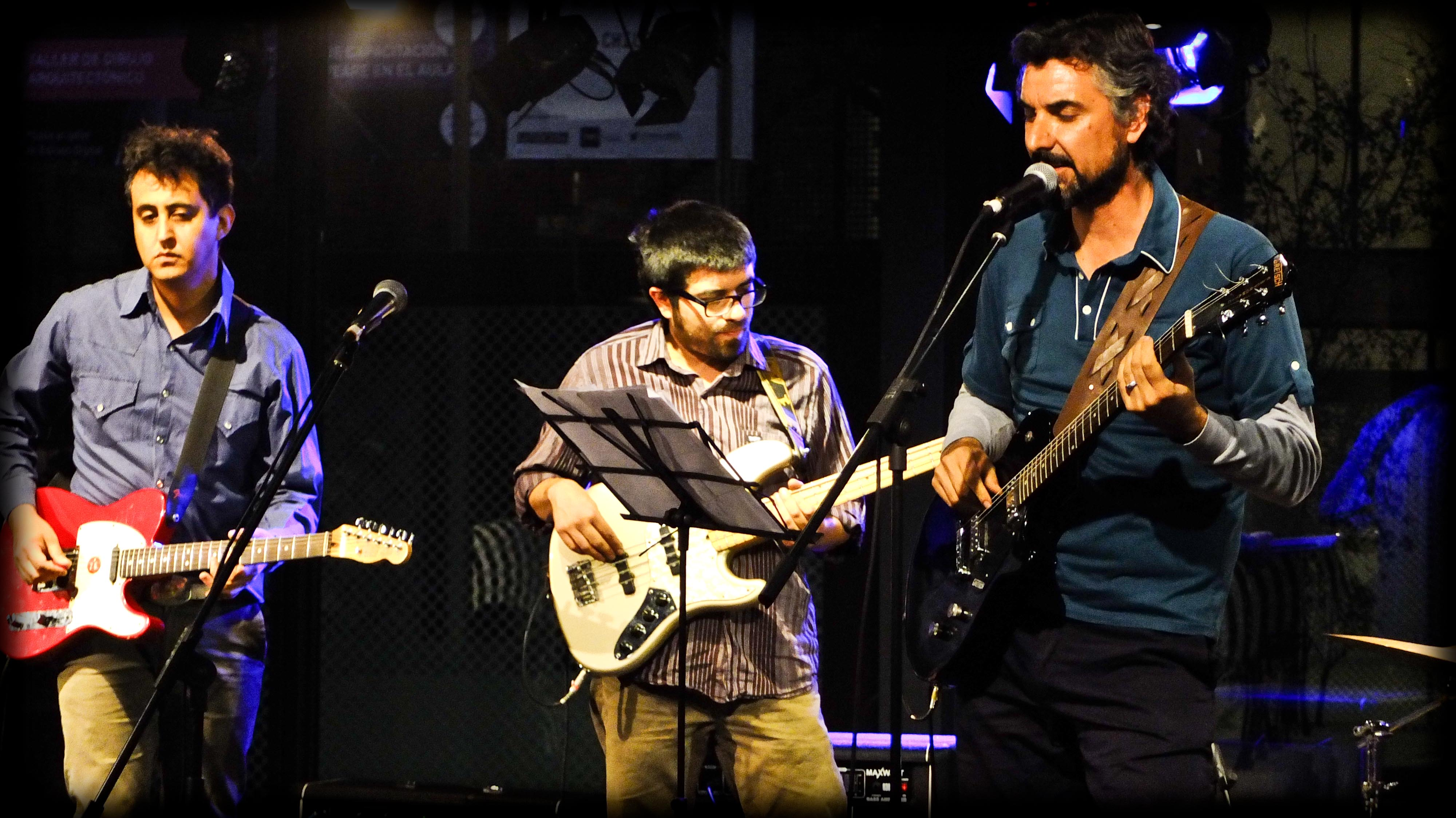 González y Los Asistentes en el Ciclo Poesía y Música 2012.